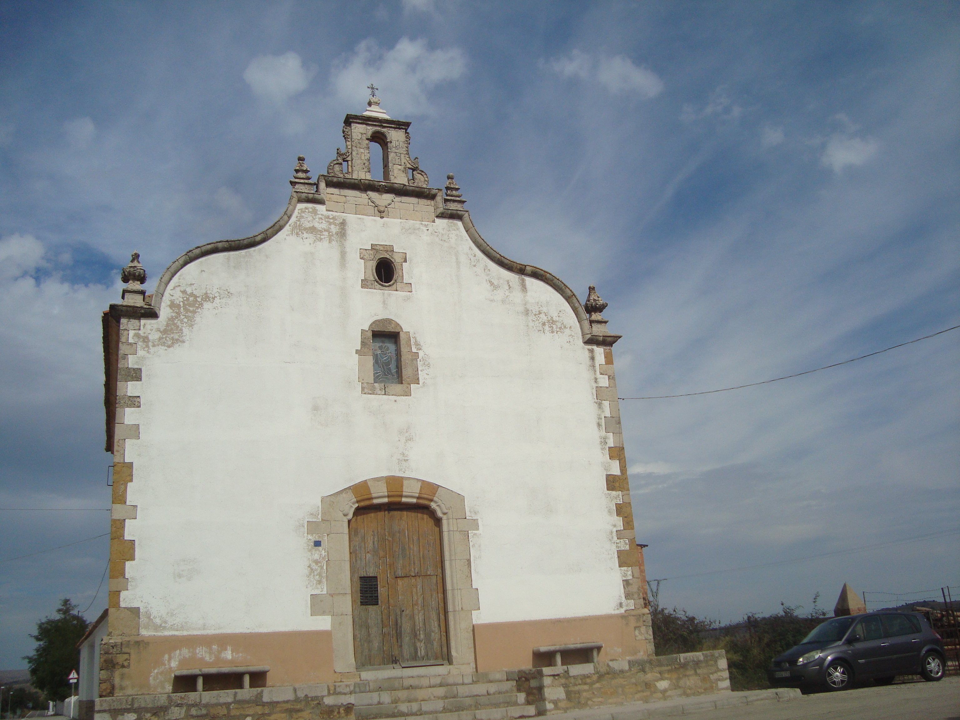 Ermita de Santa Bàrbara (Vilafranca) 02.129-011.